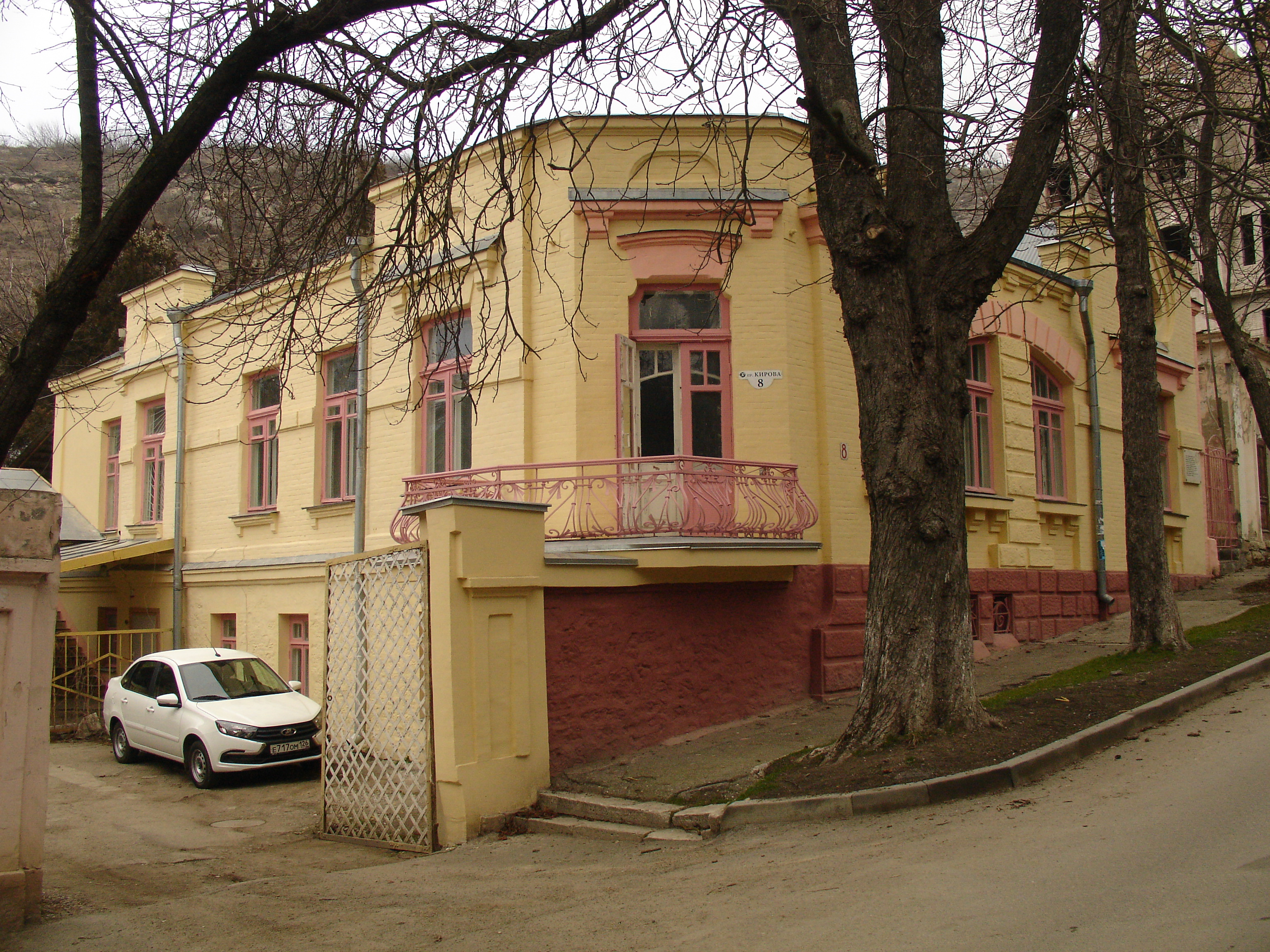 Особняк: проспект Кирова, 8, Пятигорск, Ставропольский край